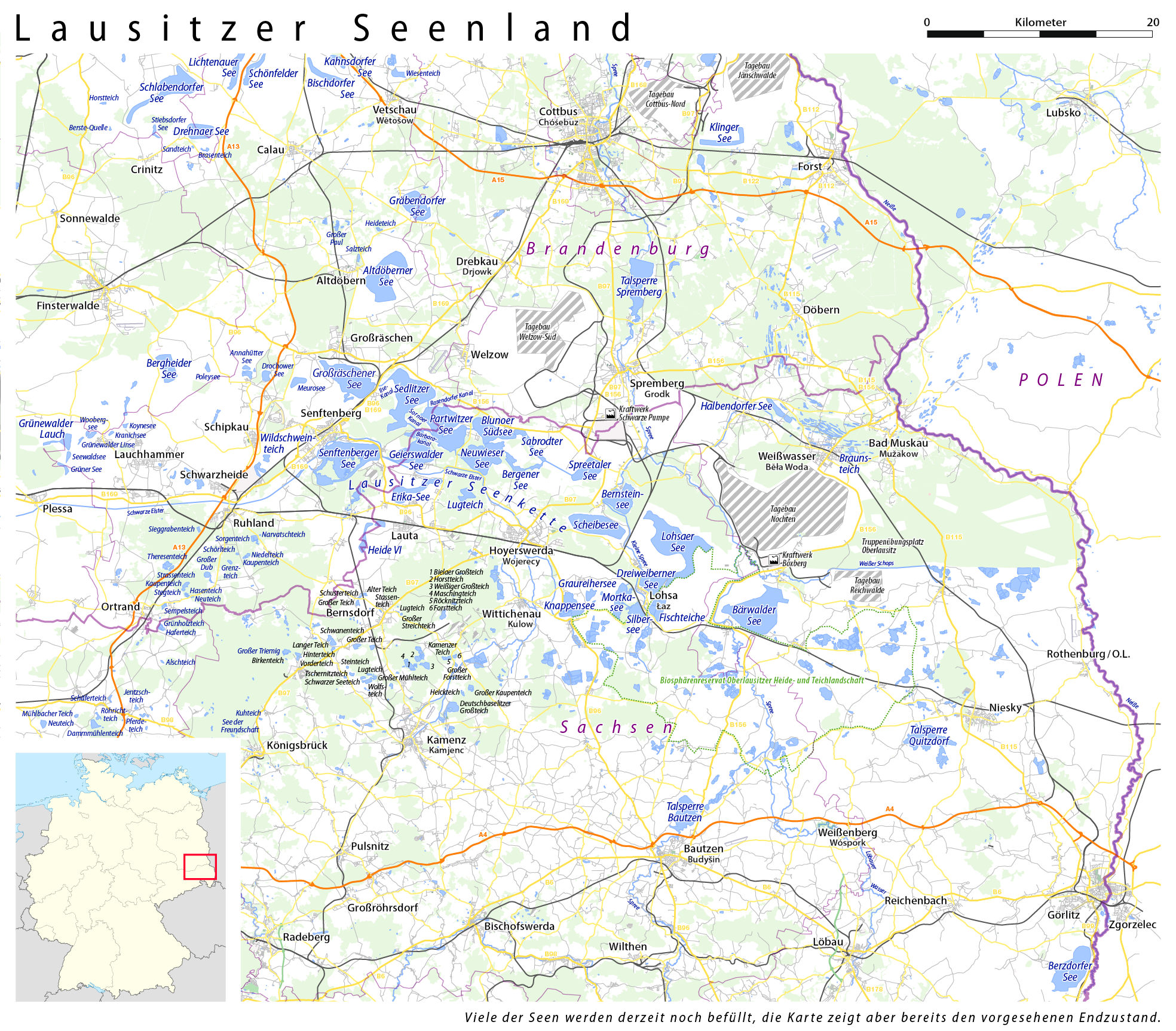 Karte vom Lausitzer Seenland